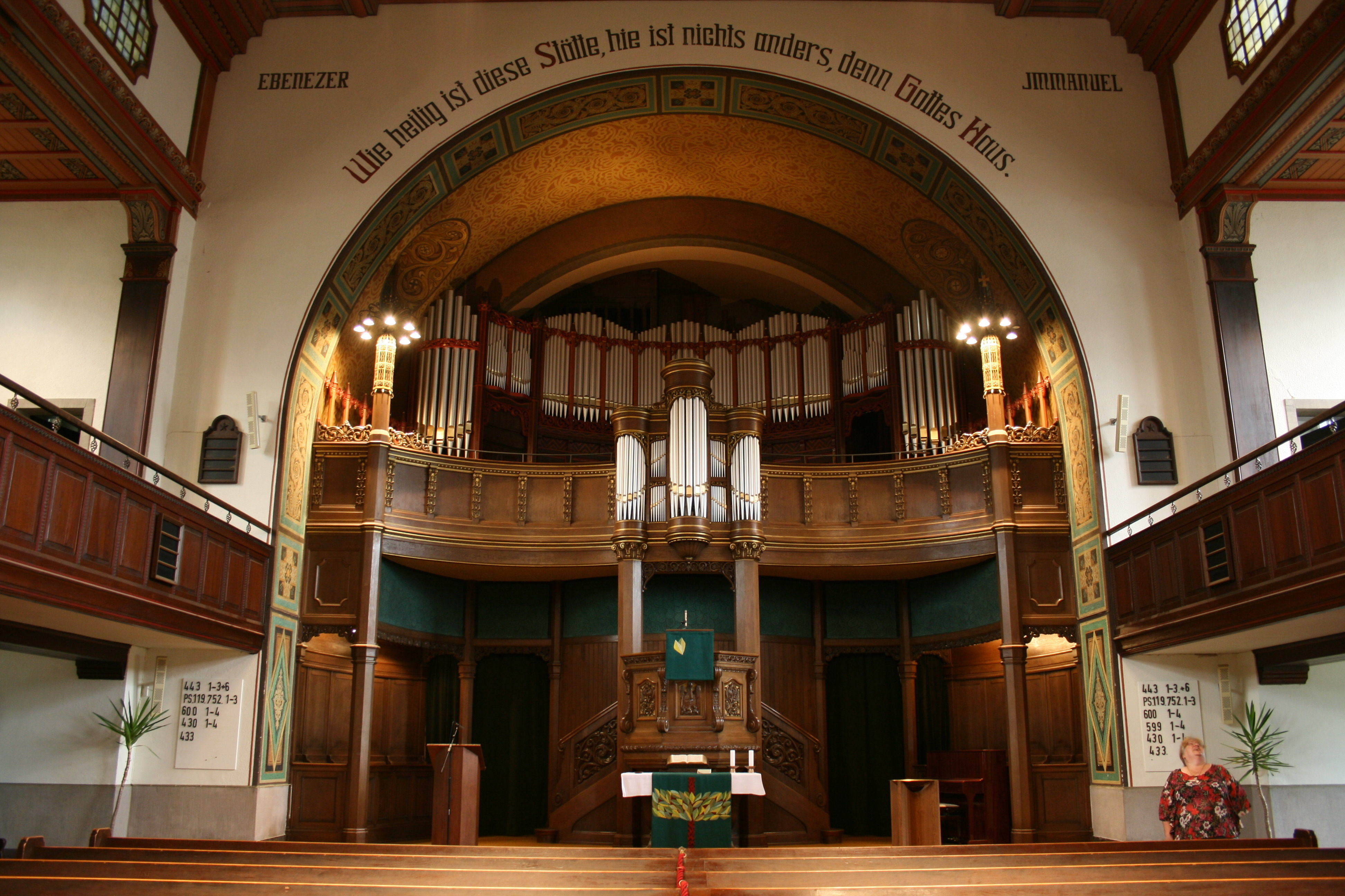 Hauptkirche Sonnborn in Wuppertal-Sonnborn